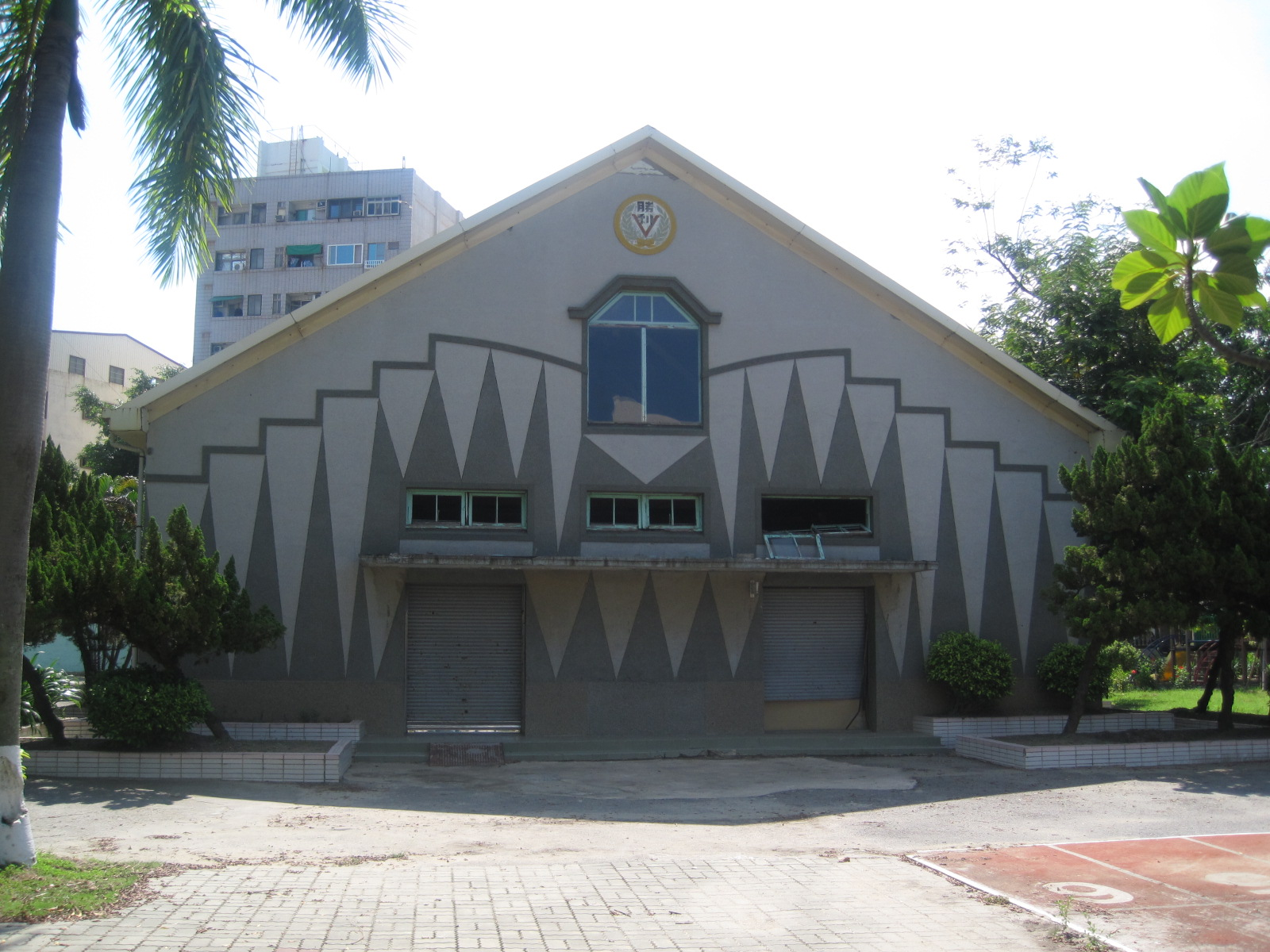 臺灣臺南市東區勝利國小禮堂。